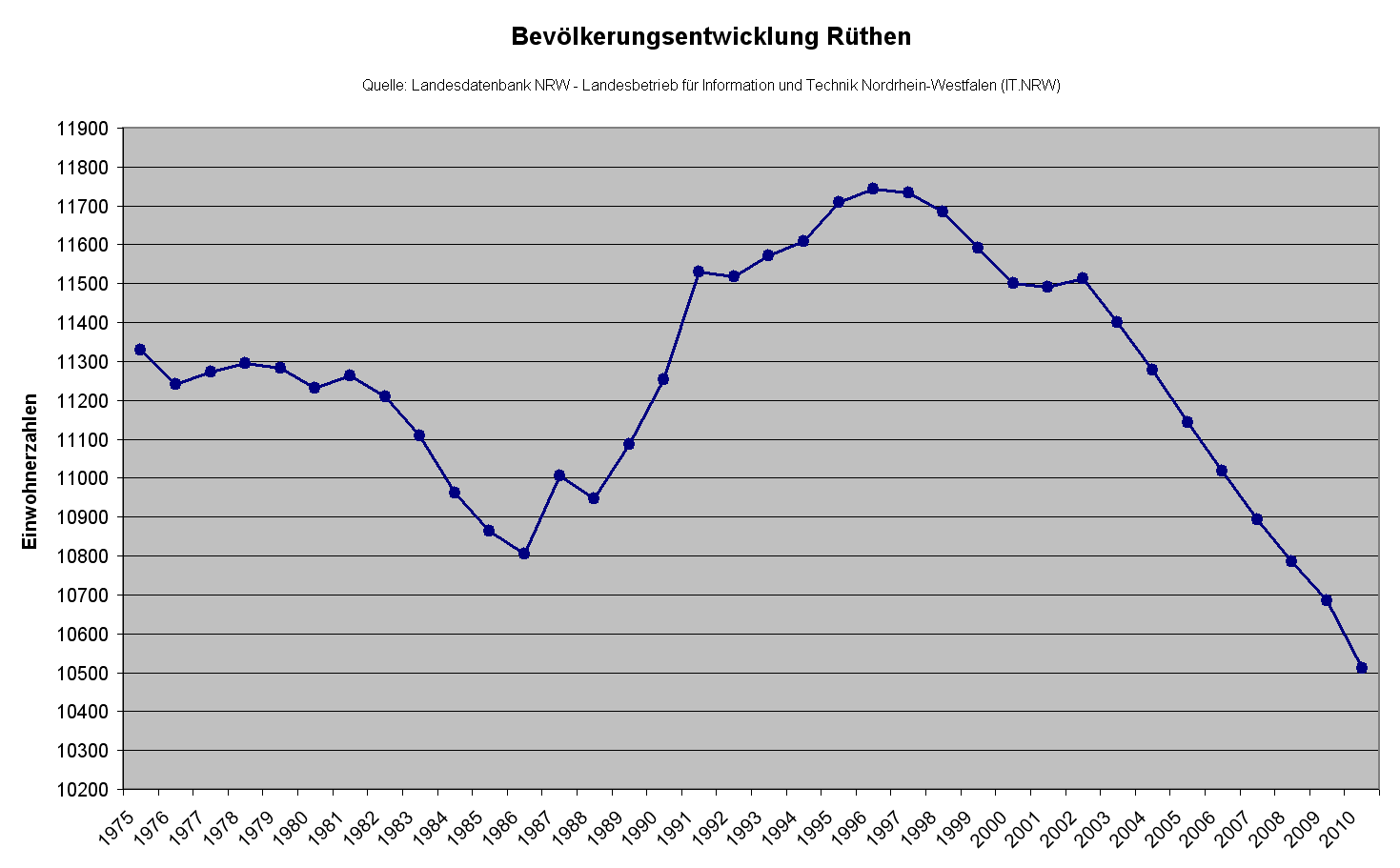 Bevölkerungsentwicklung der Stadt Rüthen in der Zeit von 1975 bis 2010.